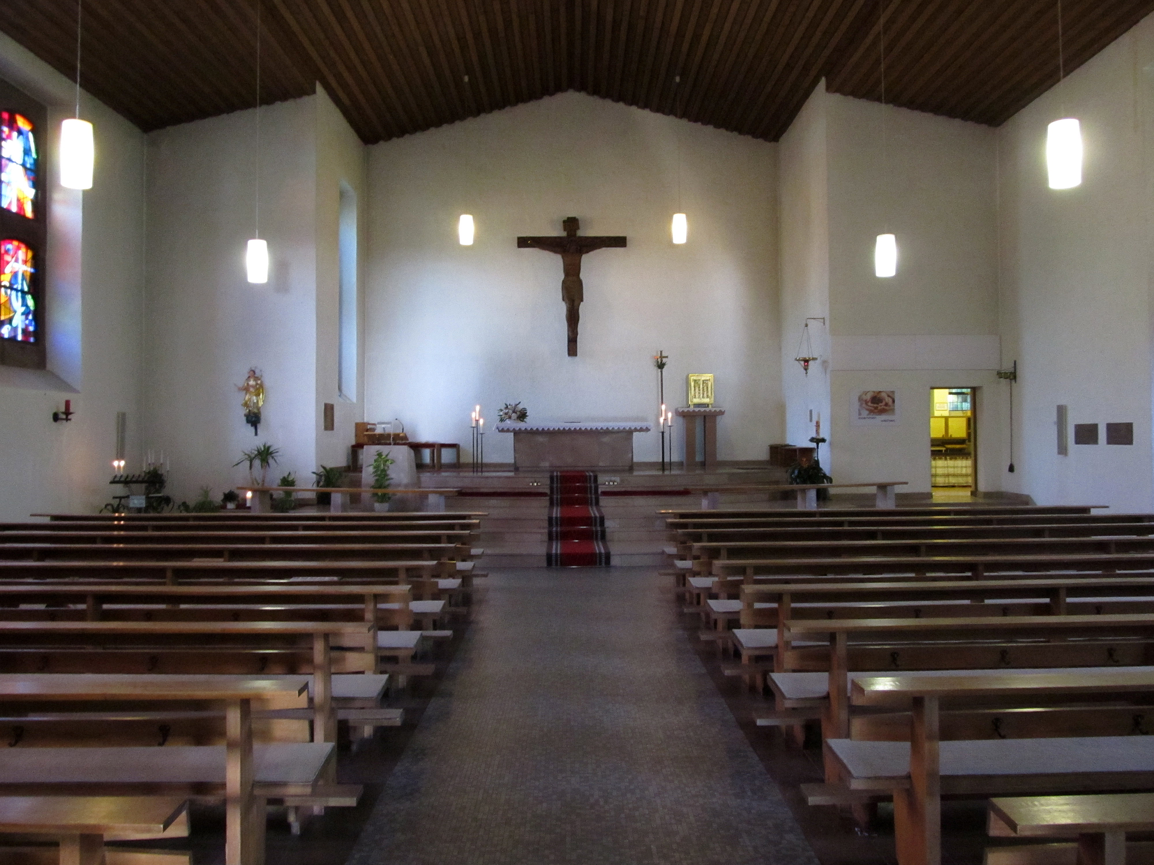 Blick ins Innere der katholischen Marienkirche in Alschbach, einem Stadtteil von Blieskastel, Saarland